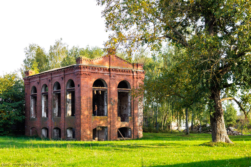 Дуброўна.